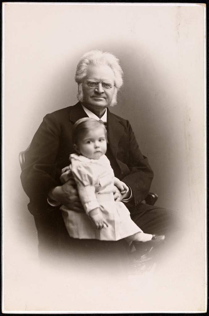 Tittel / Title: Bjørnstjerne Bjørnson og barnebarnet Bjørnstjerne Albert Bjørnson-Langen, 1900 Dato / Date: 1900 Fotograf / Photographer: Gustav Borgen (1865-1929) Eier / Owner Institution: Nasjonalbiblioteket / National Library of Norway Lenke / Link: Bildesignatur / Image Number: no-nb_bldsa_BB0127